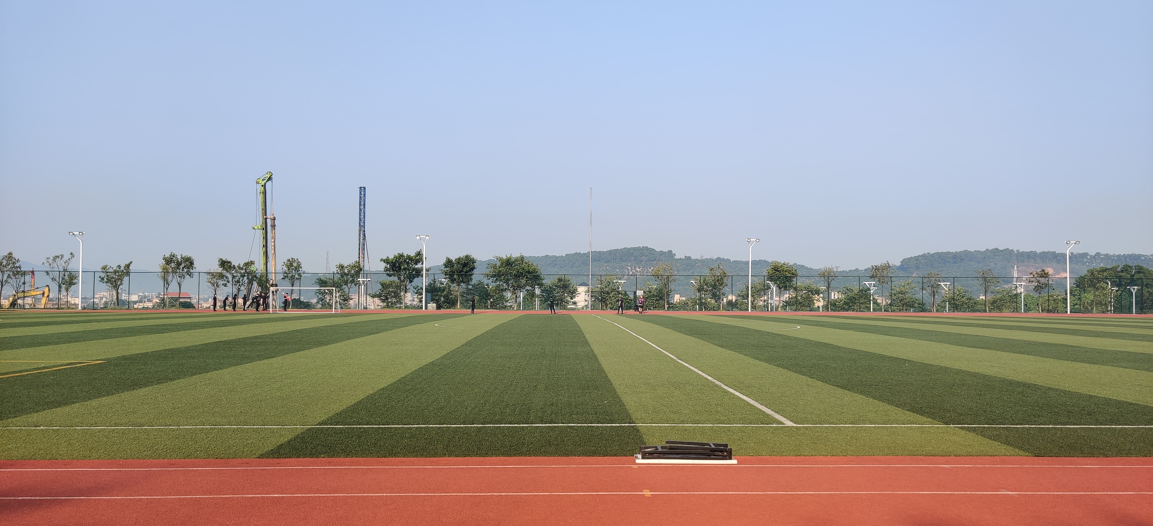 中文（中国大陆）: 广州民航职业技术学院(花都赤坭校区)操场